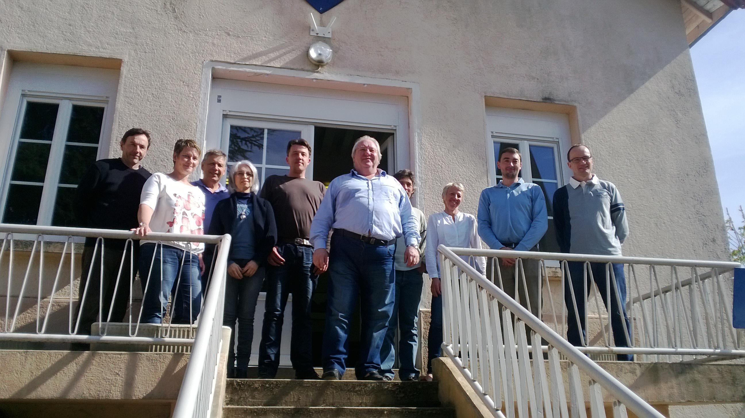 Le conseil municipal de Saint-Martin-sous-Montaigu pour la mandature 2014-2020